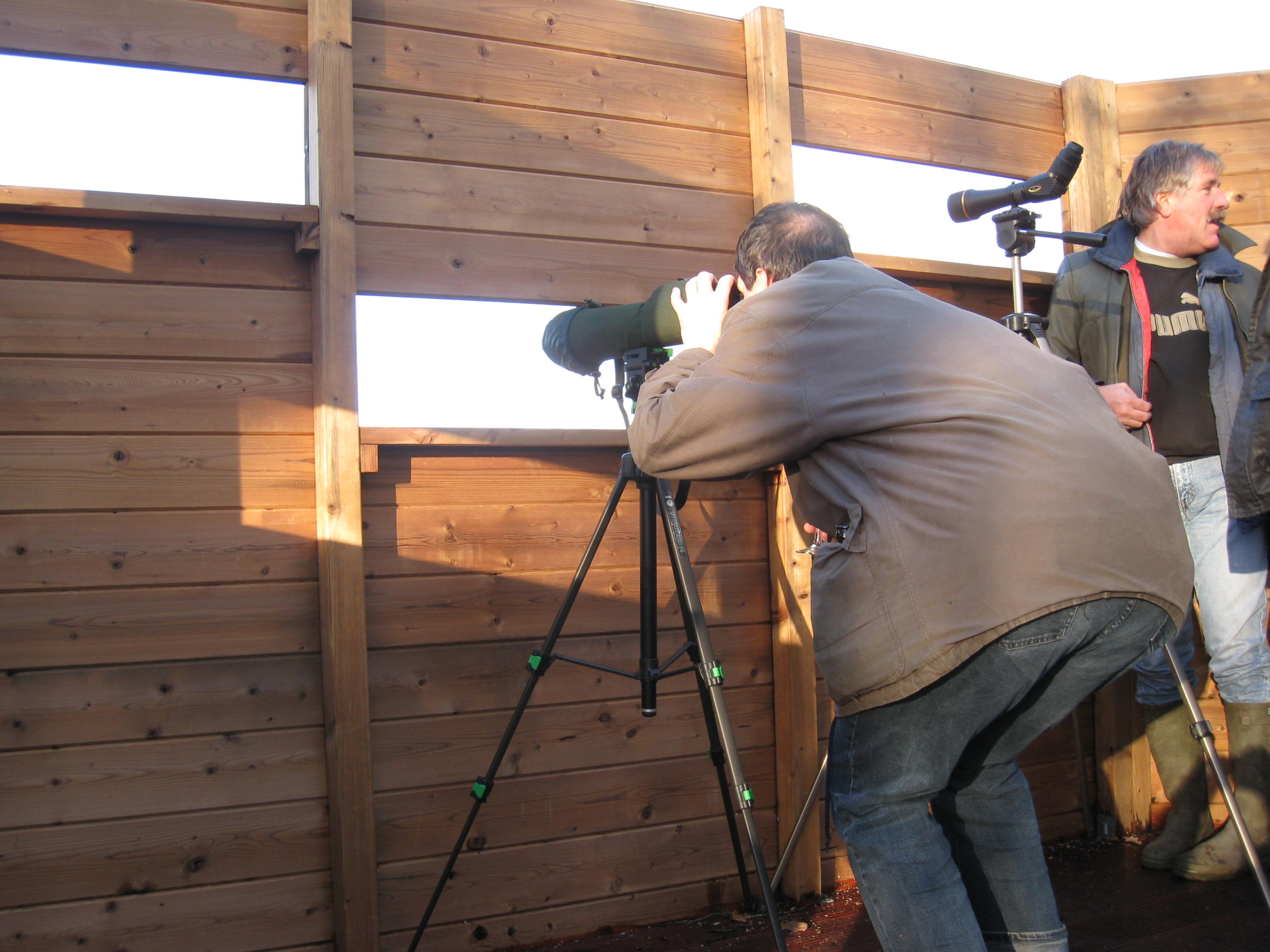 Vogelkijkwand aan De Maten (Genk)